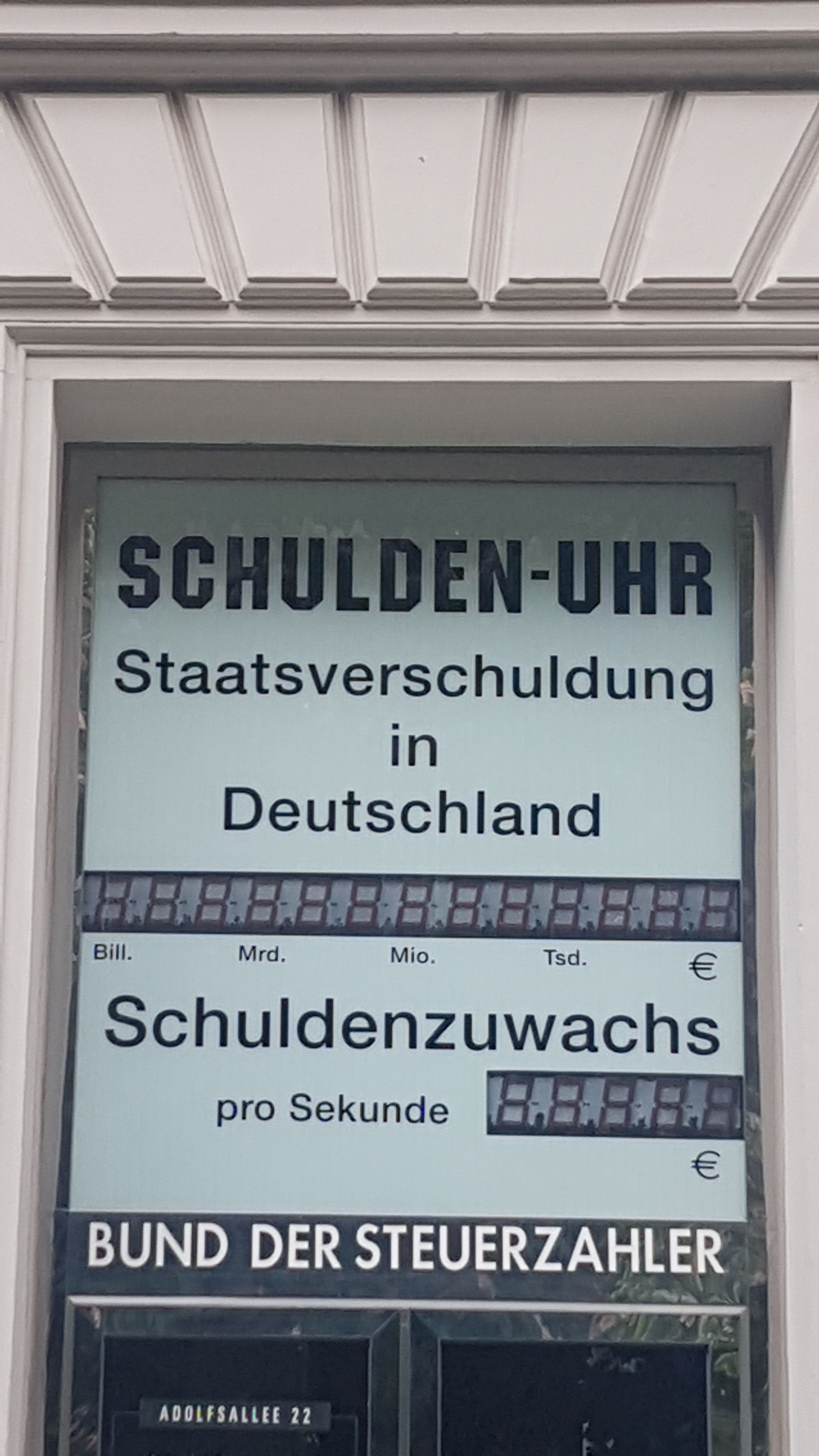 Schuldenuhr ohne Anzeigen im Mai